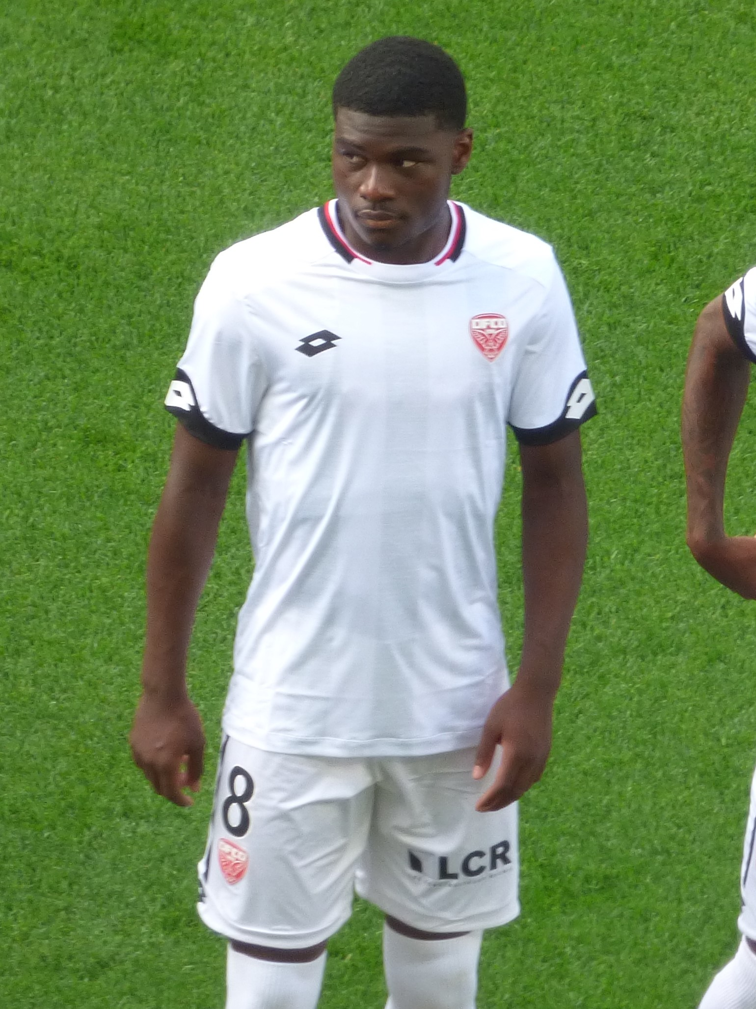 Eric Junior Dina-Ebimbe lors du match amical RC Lens / Dijon FCO, le 15 août 2020, au Stade Bollaert-Delelis de Lens.